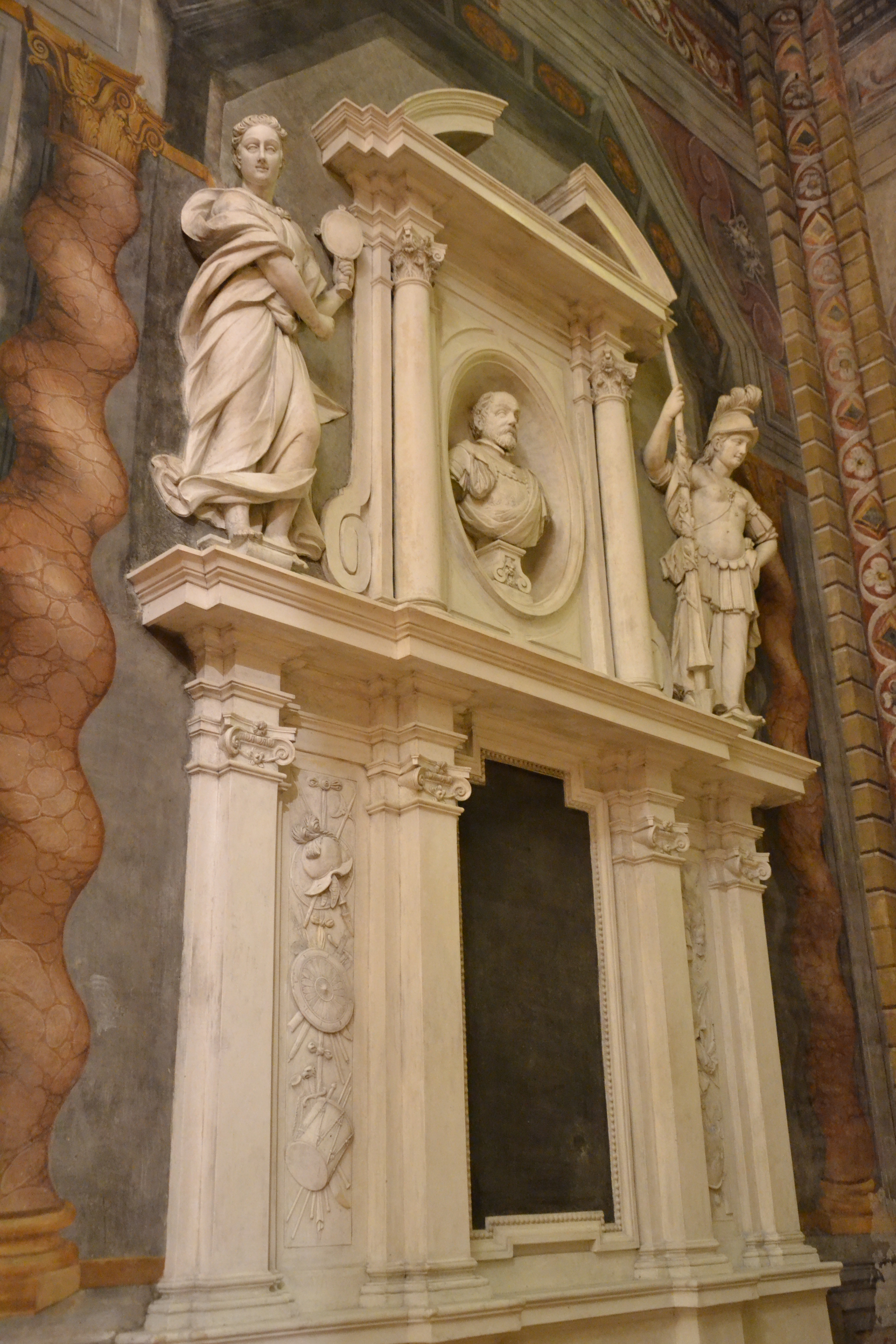 Chiesa di Santa Maria del Carmine (Pavia)